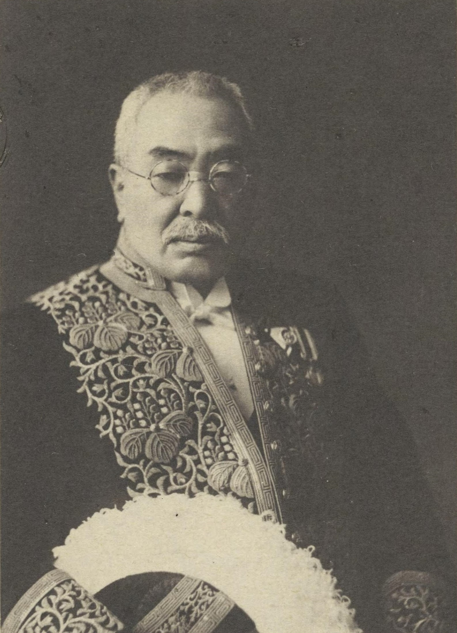 文官大礼服を着用した小堀鞆音。